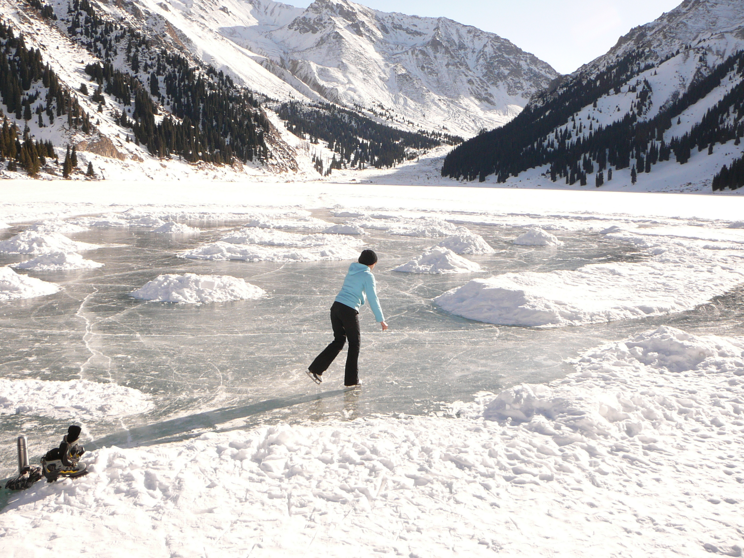 Большое Алматинское Озеро в декабре. На озере образуется лёд толщиной до метра, на котором горожане катаются на коньках.